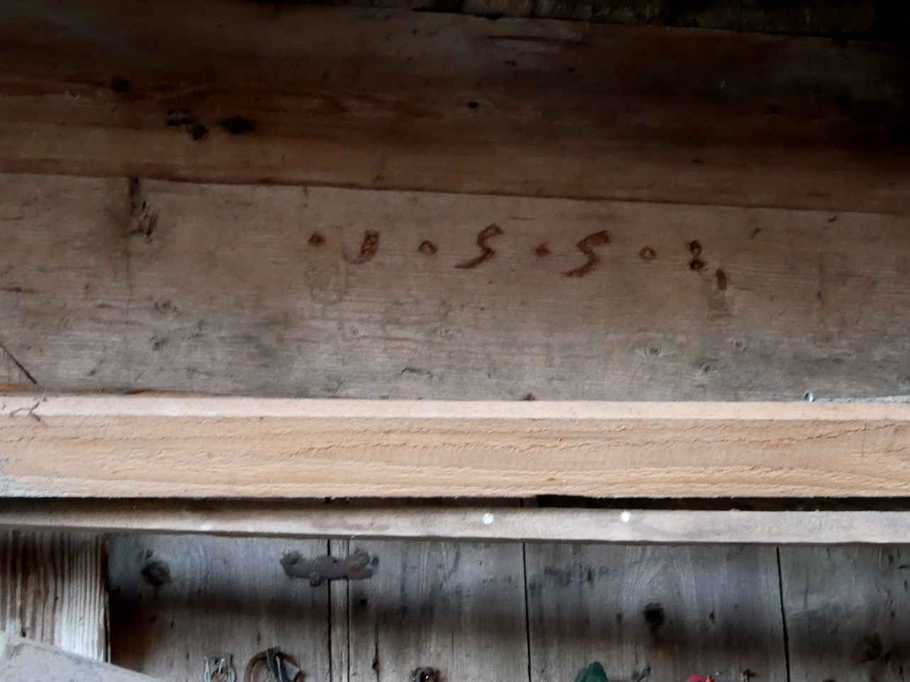 Steingaden, Ortsteil Urspring, Kirchenstr. 6: Balken mit Jahreszahl 1558 oberhalb Eingang zum Getreidekasten